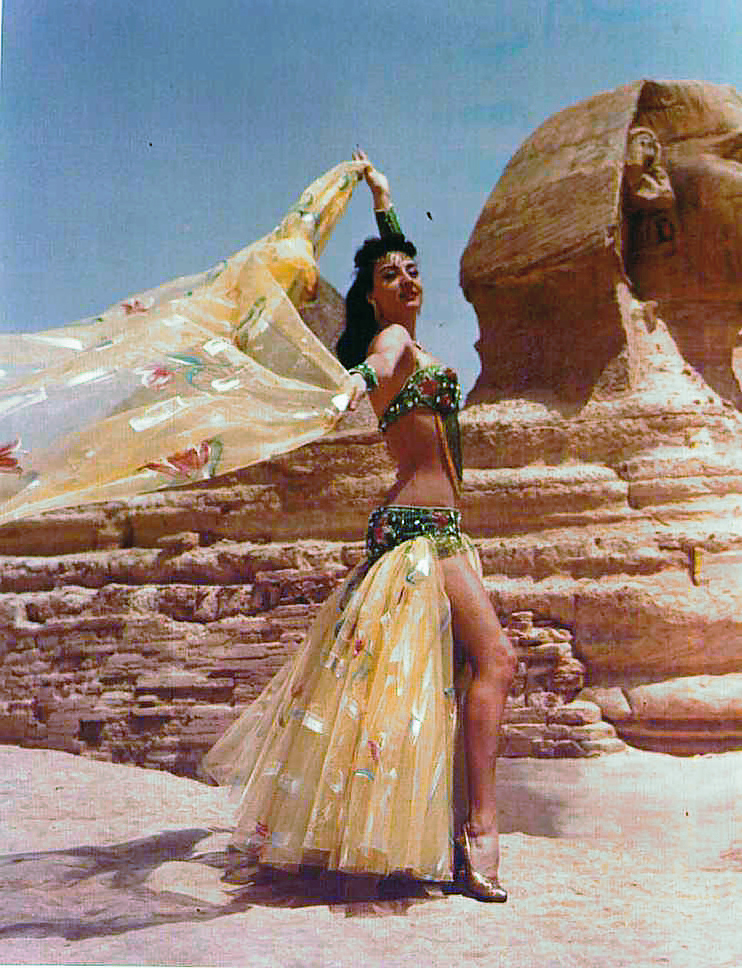 Dalilah, bailarina legendaria de la época dorada del baile en Oriente Medio, bailando delante de las pirámides, en El Cairo.